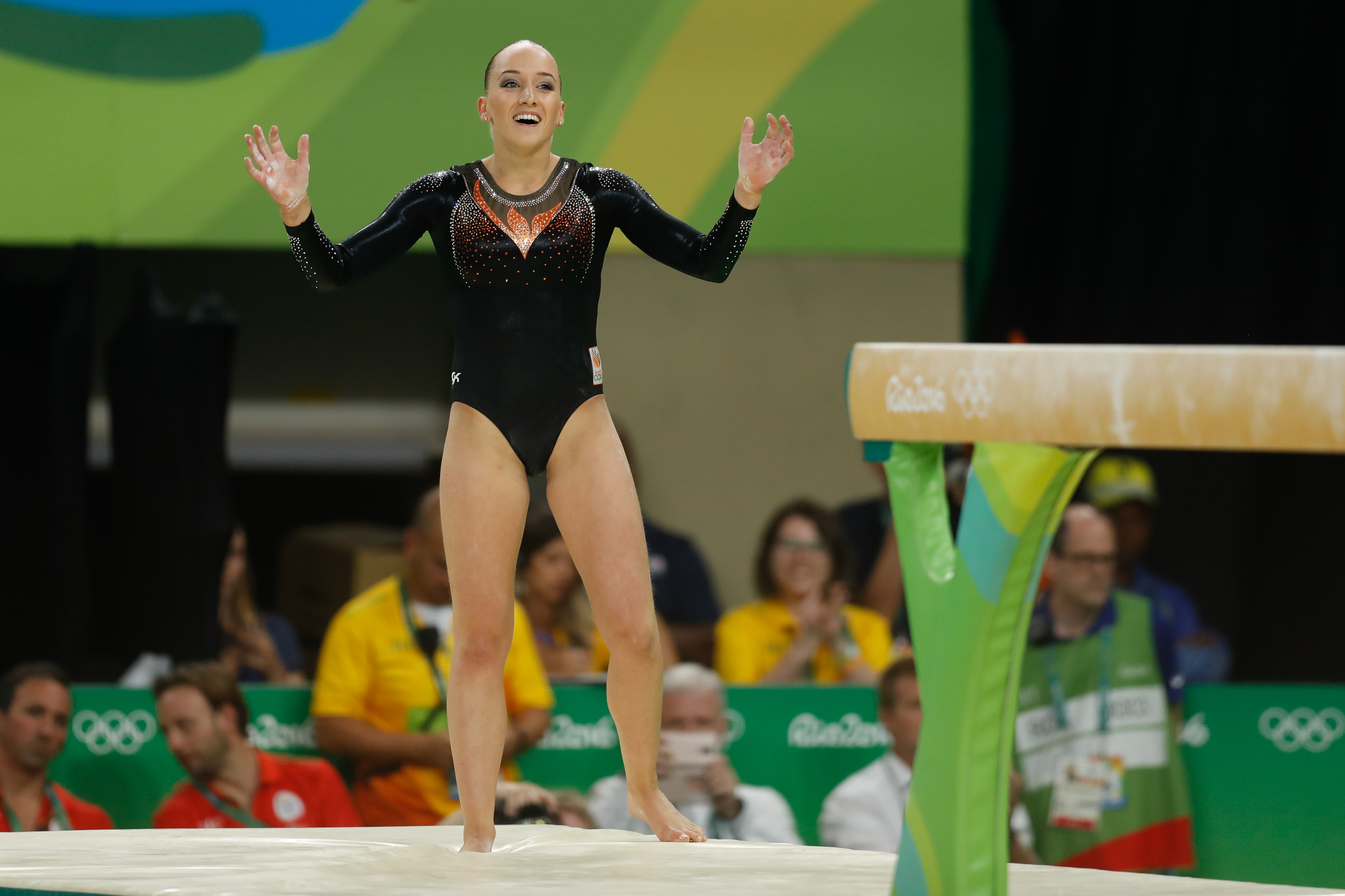 Rio de Janeiro - Ginasta da Holanda Sanne Wevers leva medalha de ouro ao vencer a prova final por aparelhos da trave (Fernando Frazão/Agência Brasil)